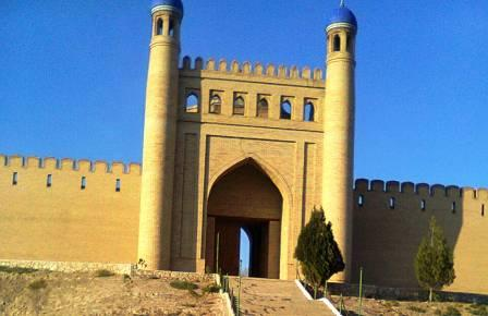 Крепость Мугтепа в г. Истаравшане (Таджикистан)Тоҷикӣ: Қалъаи Муғ дар ш. Истаравшан (Тоҷикистон)